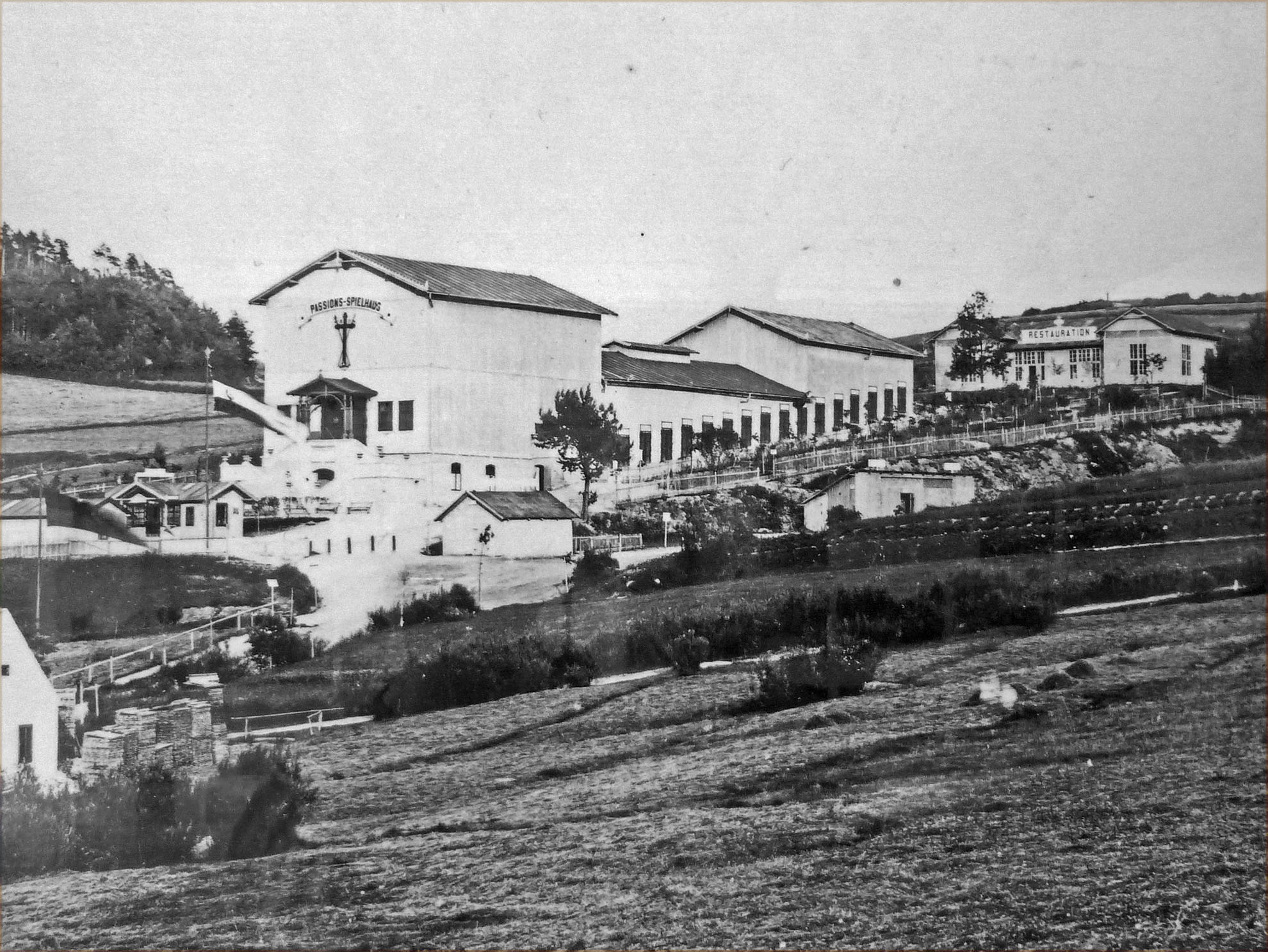 Ehem. Passionsspieltheater in Höritz (Hořice na Šumavě) im Böhmerwald